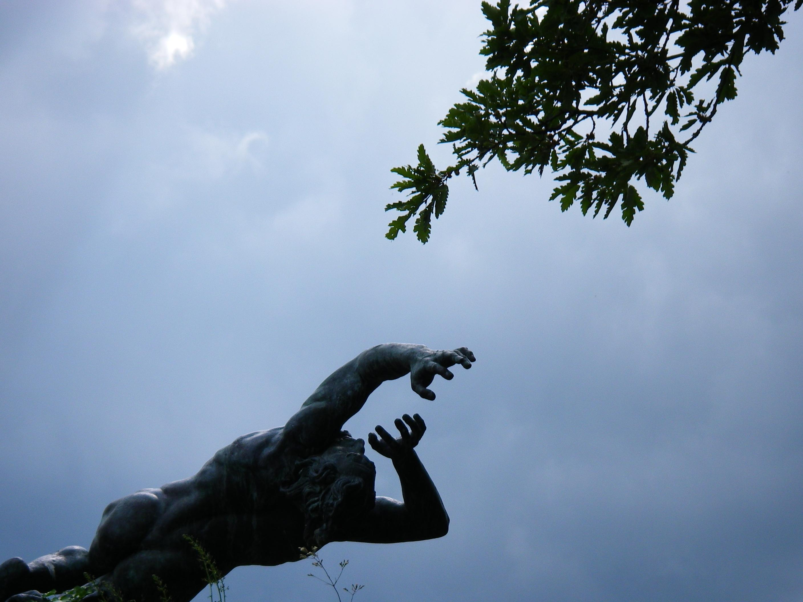 Marcello Tommasi, Saulo. Bronzo. Museo Michelangiolesco, Caprese Michelangelo (AR)